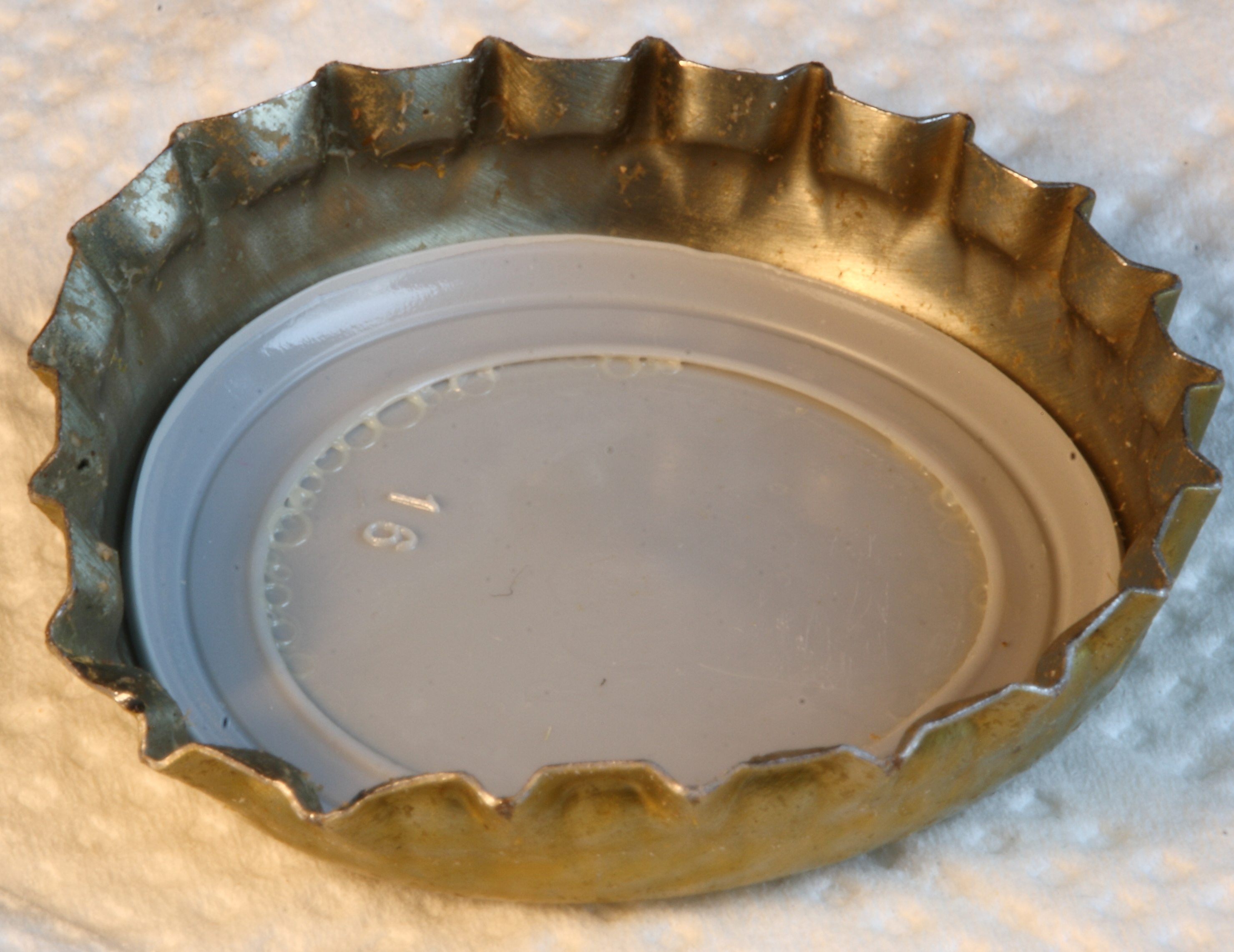 Benutzter Kronkorken